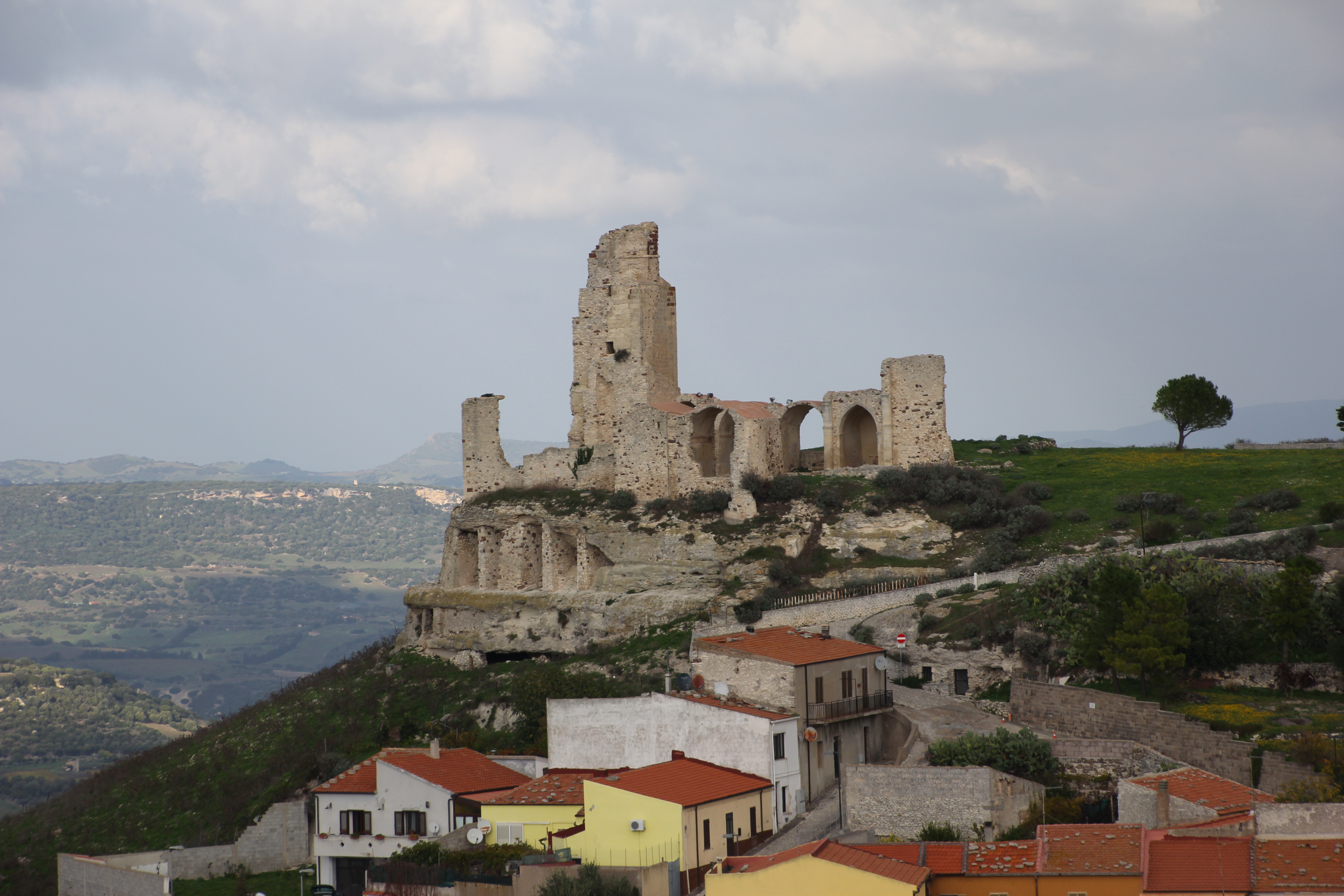 Chiaramonti - Castello dei Doria